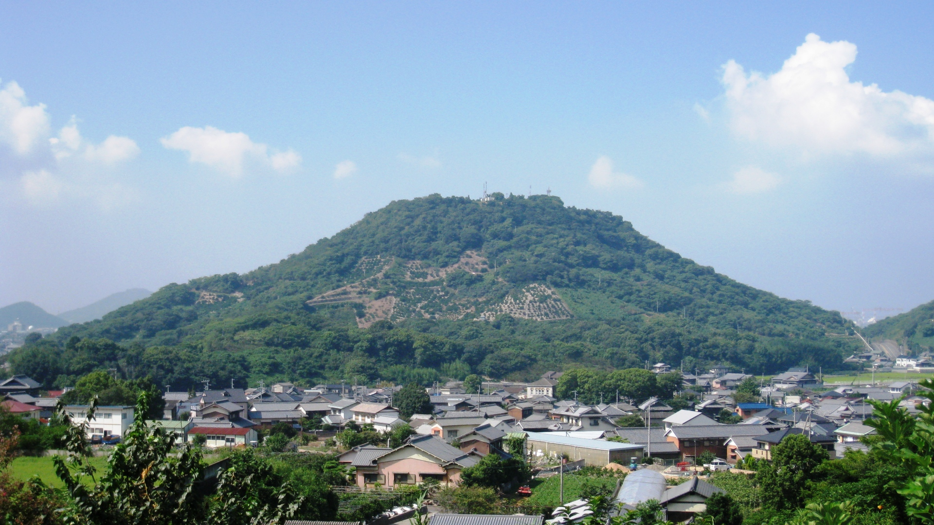 香川県坂出市にある雄山を東側の五色台麓から撮影。山頂に位置するのは坂出東テレビジョン中継局。